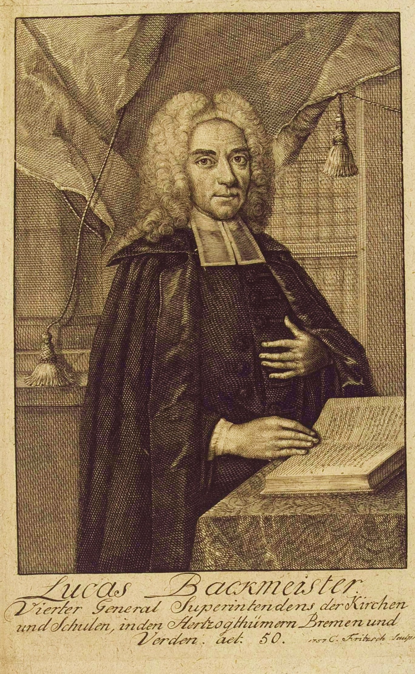 Scan eines Kupferstiches von Christian Fritzsch in der Herzog August Bibliothek